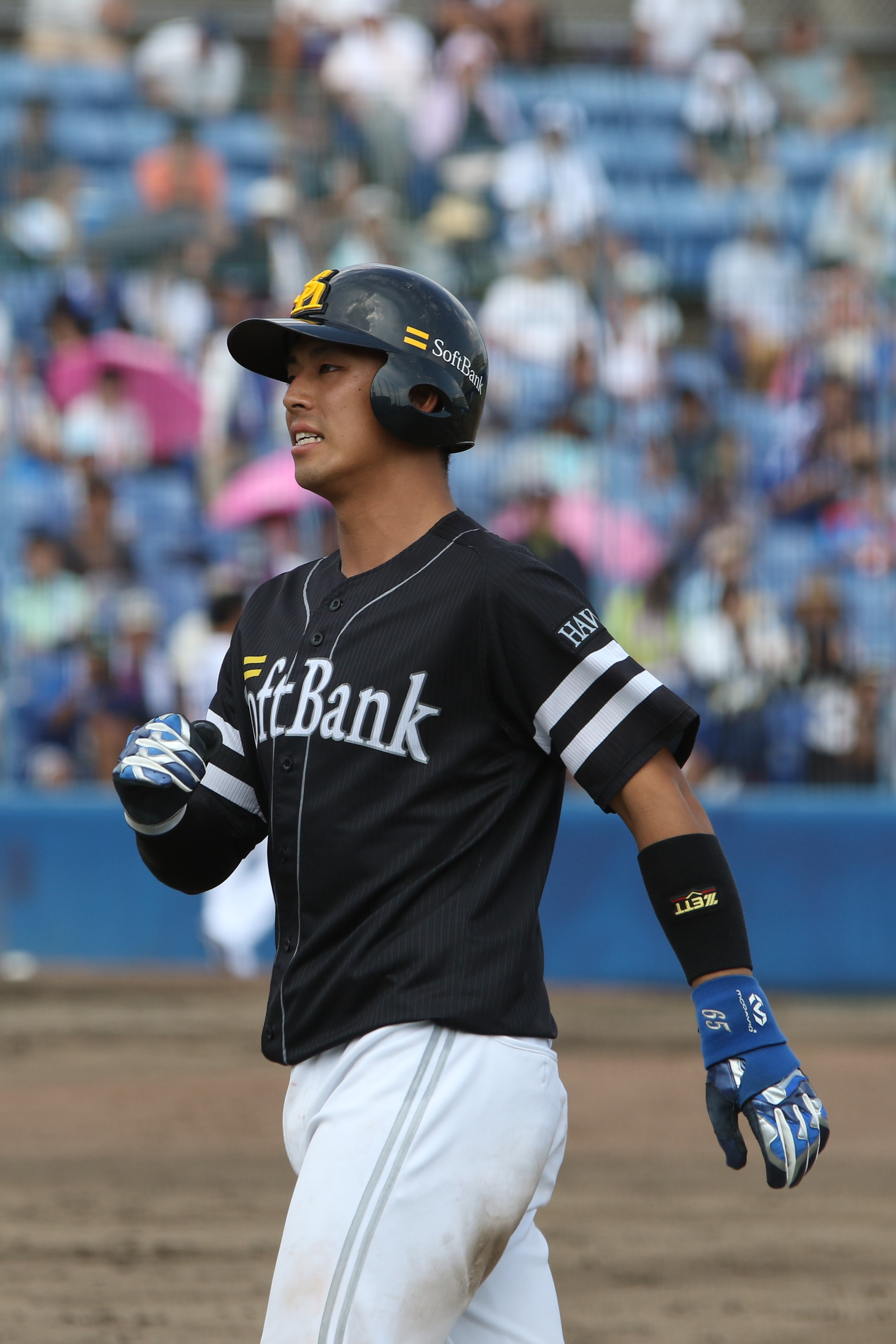 試合に出場する九鬼隆平